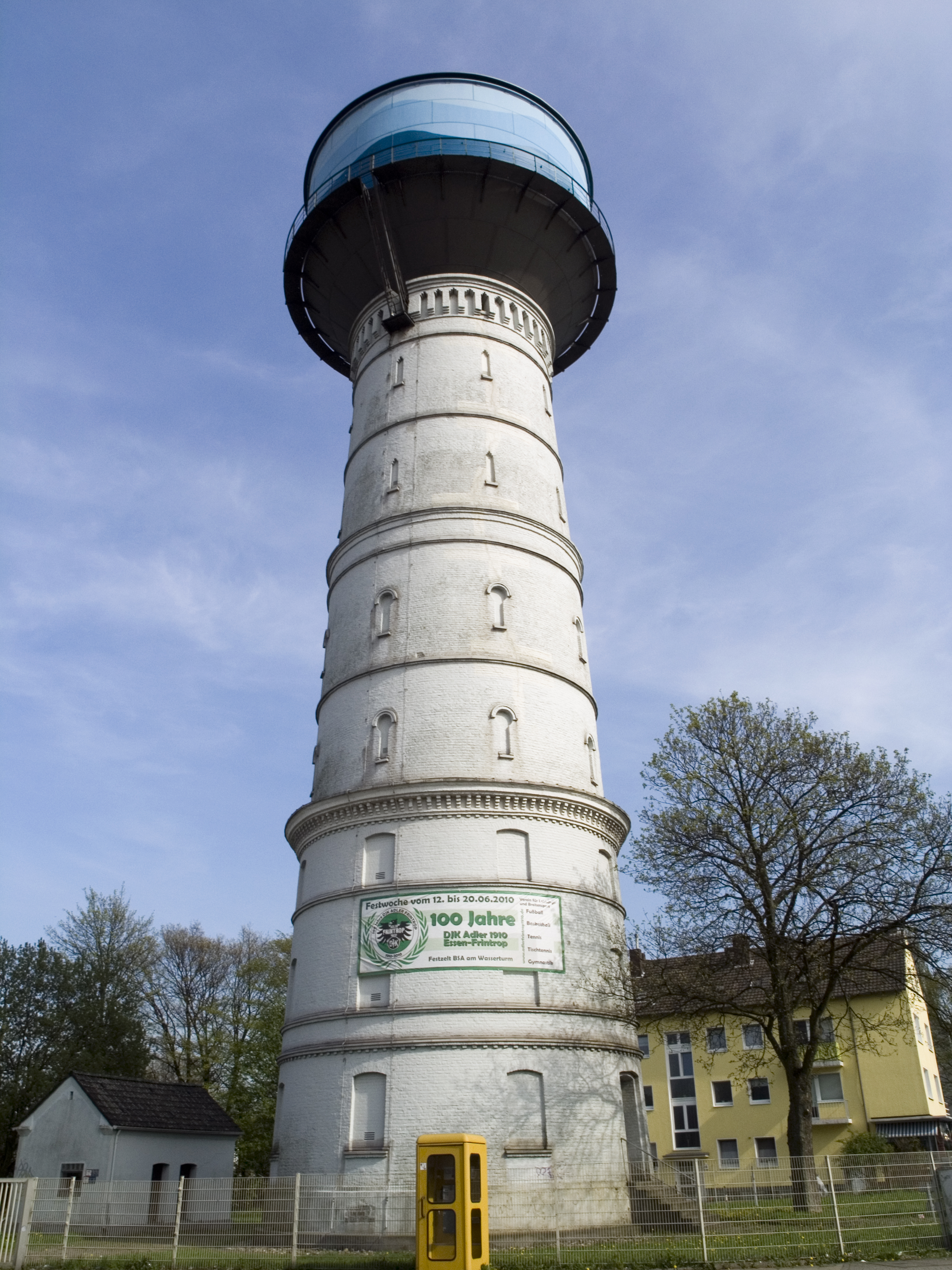 Северный Рейн - Вестфалия, Эссен - водонапорная башня Фринтроп